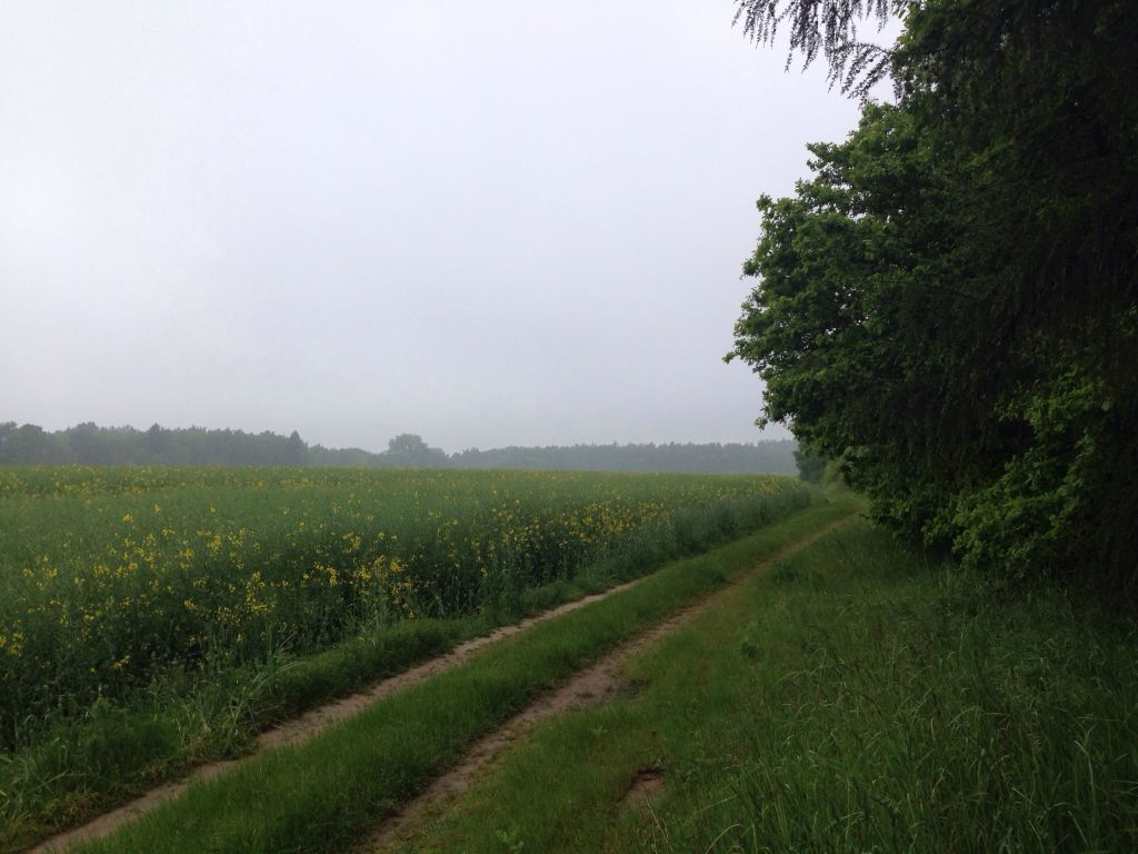 Szlak pieszy nr 3575 - widok